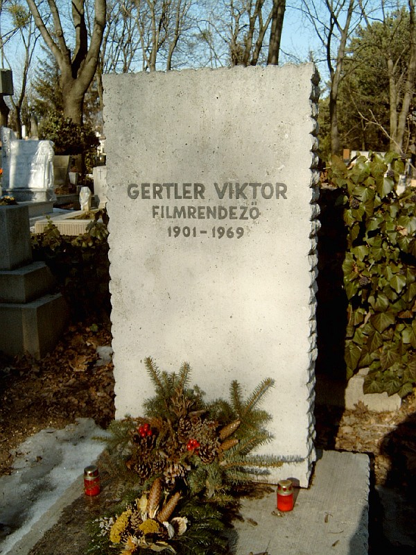 Gertler Viktor sírja Budapesten. Farkasréti temető: 6/9-1-146.